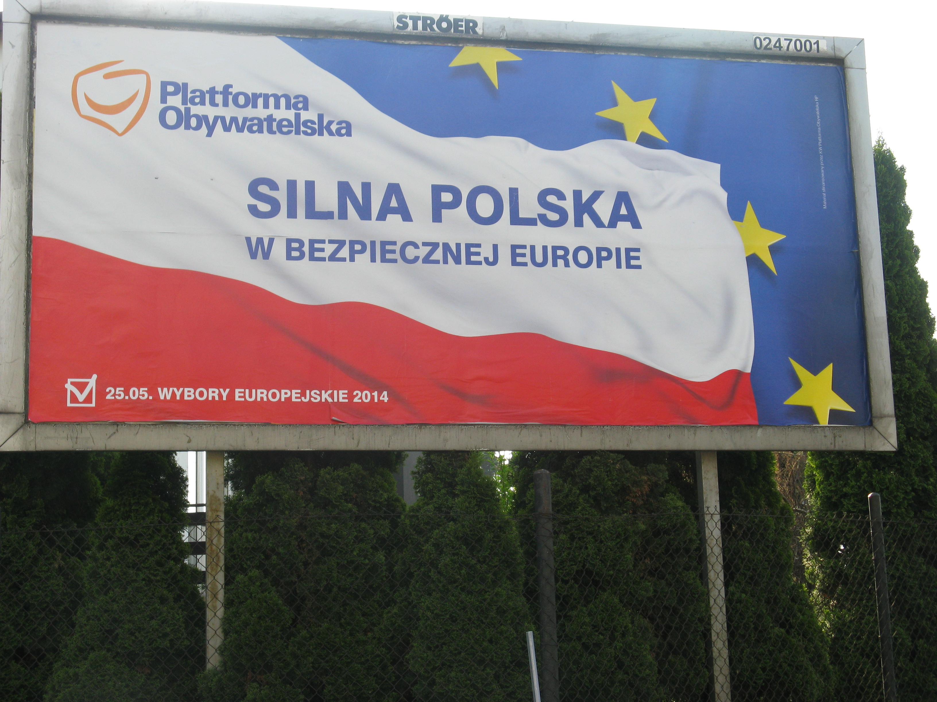 Plakat Platformy Obywatelskiej w wyborach do Parlamentu Europejskiego w 2014 roku